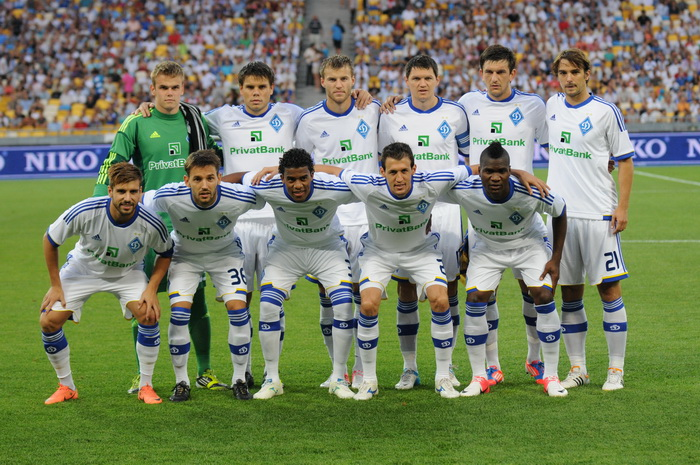 Динамо (Київ) перед дебютним матчем в єврокубках проти Феєнорда.